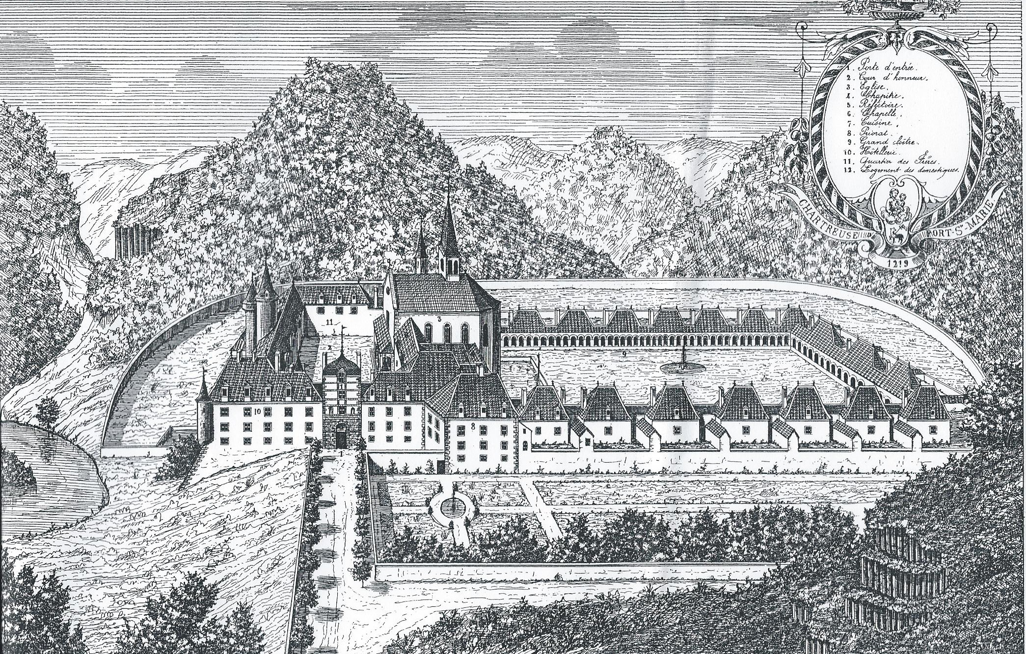 Vue du site et des bâtiments de la chartreuse de Port-Sainte-Marie située en Auvergne, au cœur des Combrailles, à la limite du Limousin, au fond de la vallée de la Sioule.